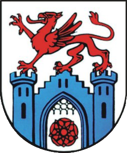 poprawny herb Pyrzyc